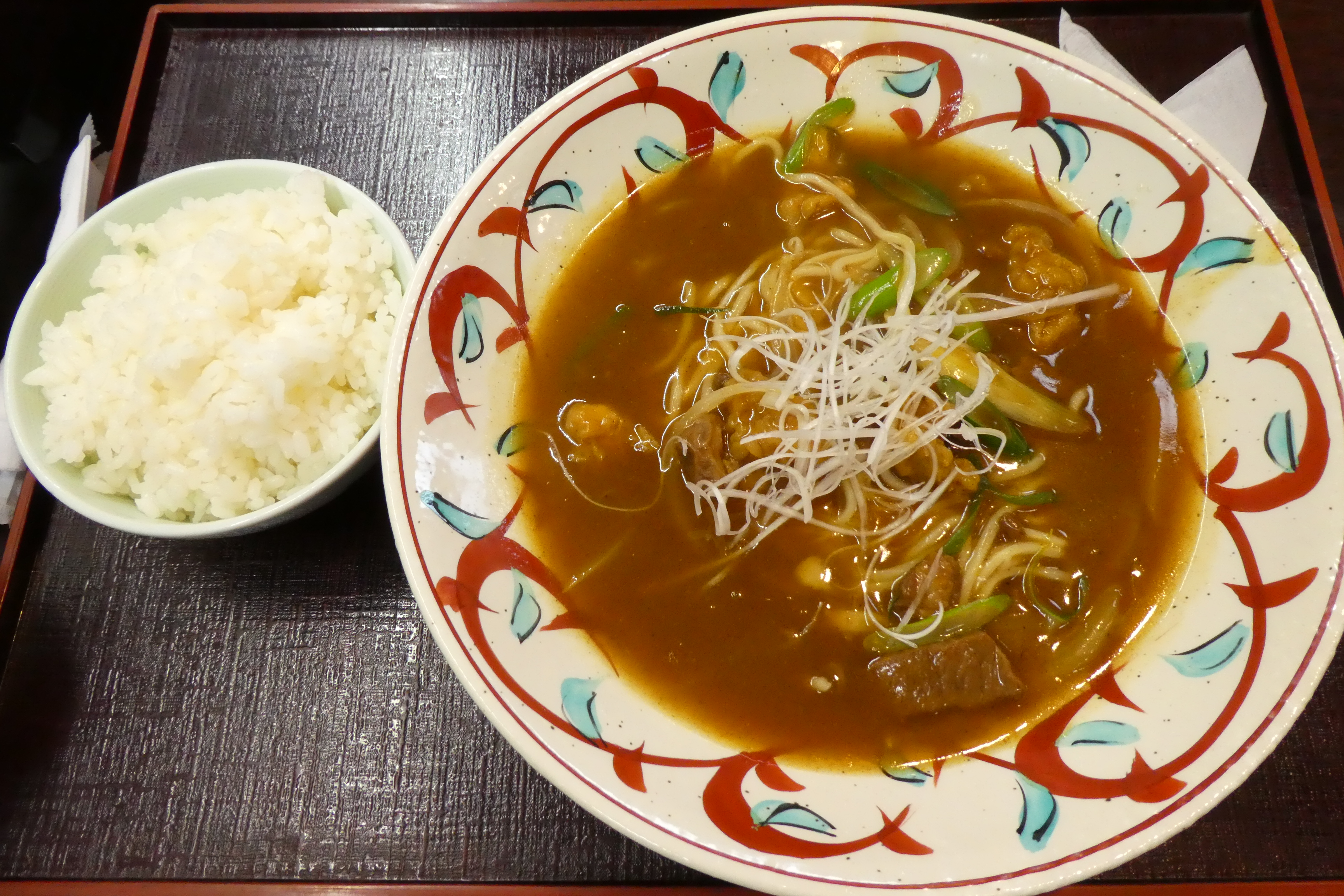 宮津カレー焼きそば。橋立海産センター瑞松苑にて。